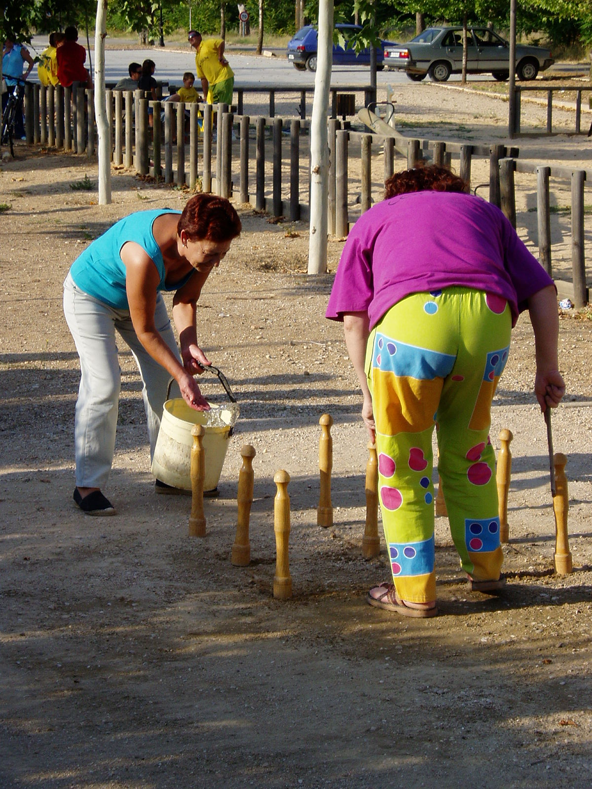 Colocando los bolos en la posición adecuada